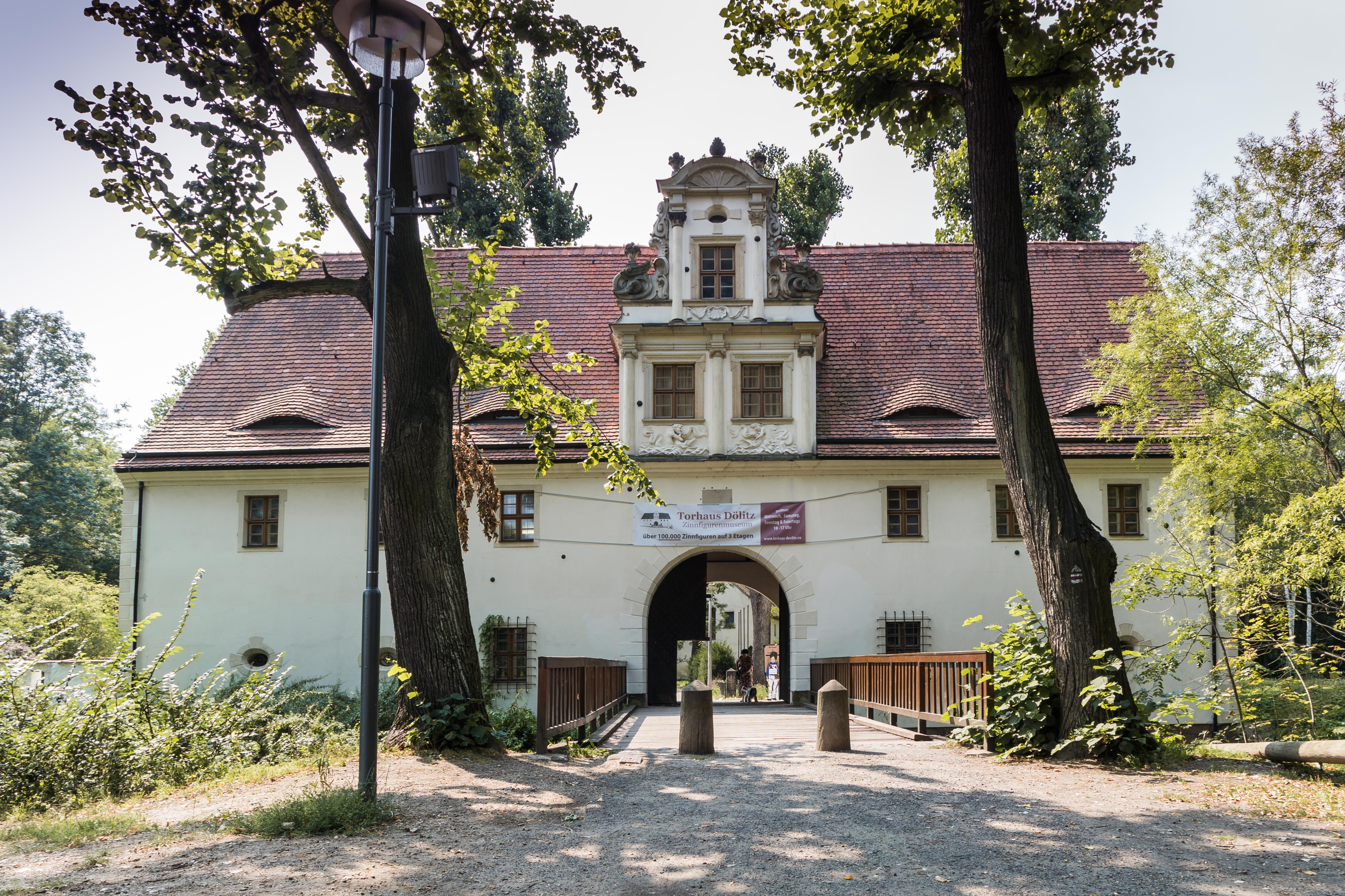 Torhaus Schloss Dölitz